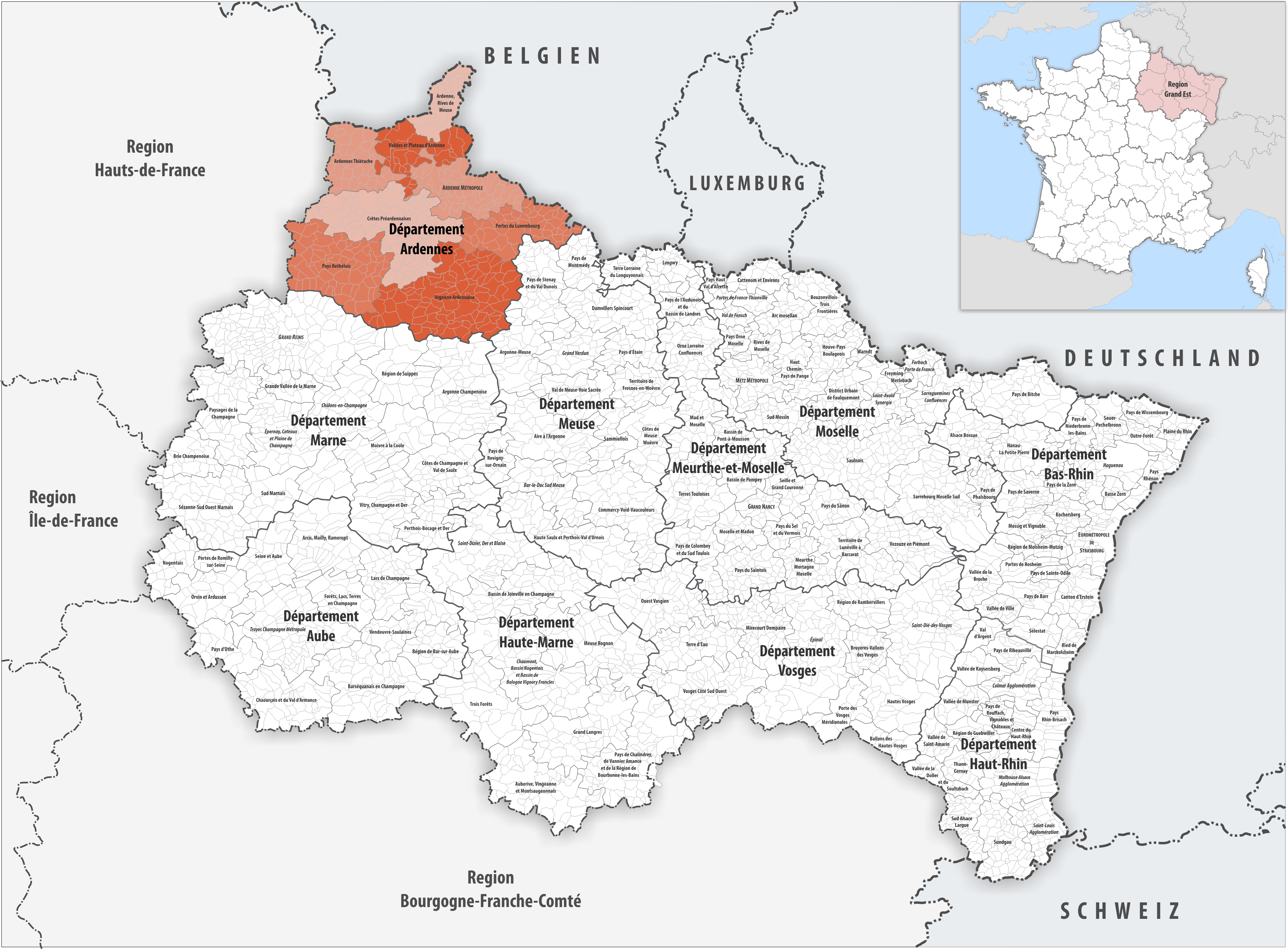 Gemeindeverbände im Département Ardennes